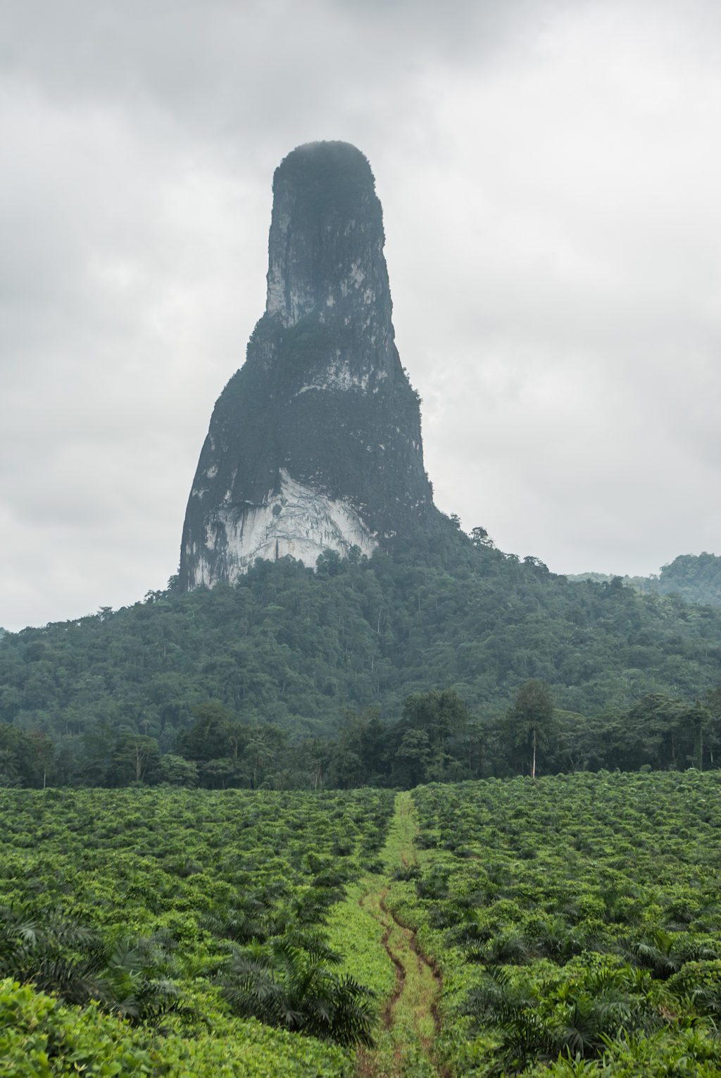 2012SaoTome-470